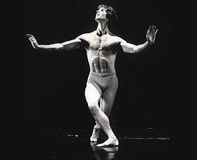 דוד דביר בריקוד